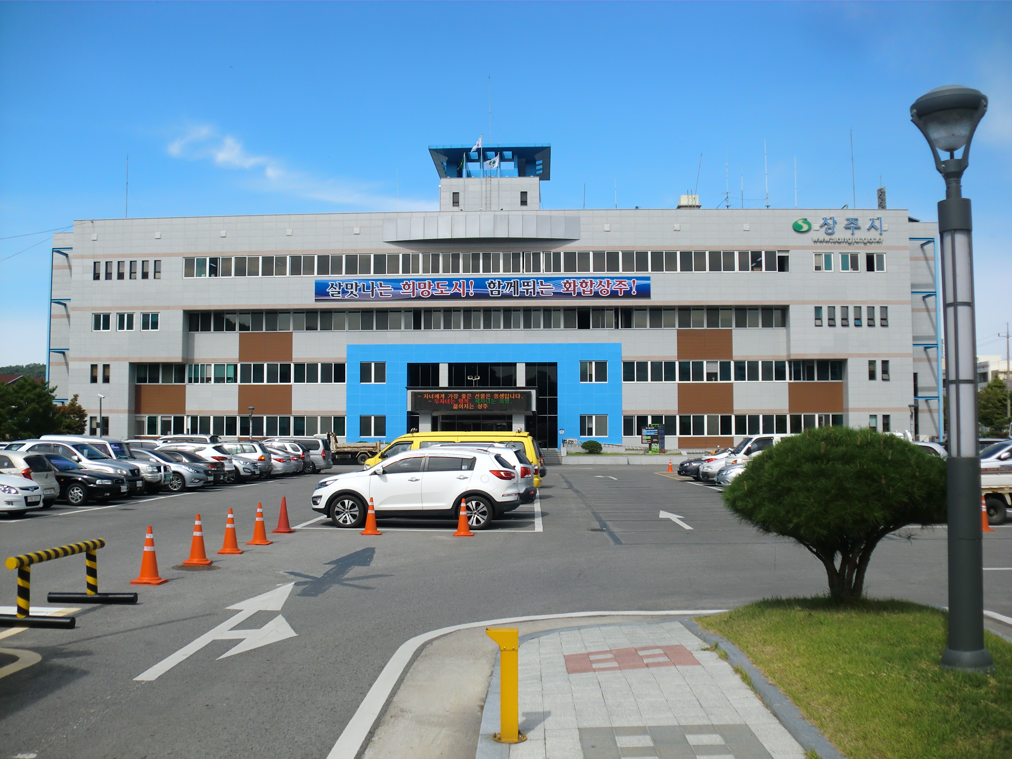 경상북도 상주시에 있는 상주시청